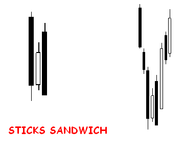 Analisi Tecnica, Candele giapponesi, Stick Sandwich